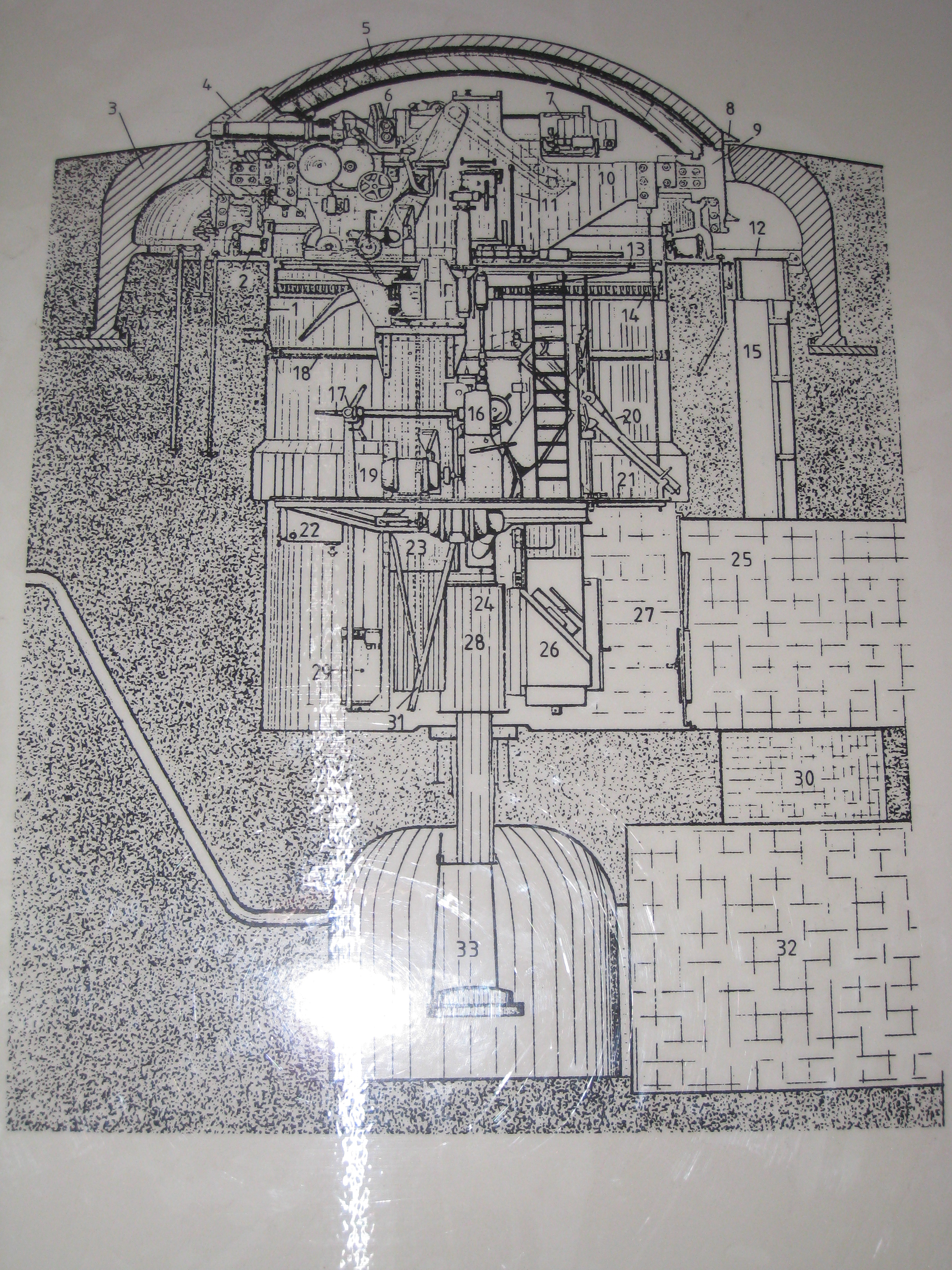 Koepel 120, Fort Eben-Emael, Doorsnede